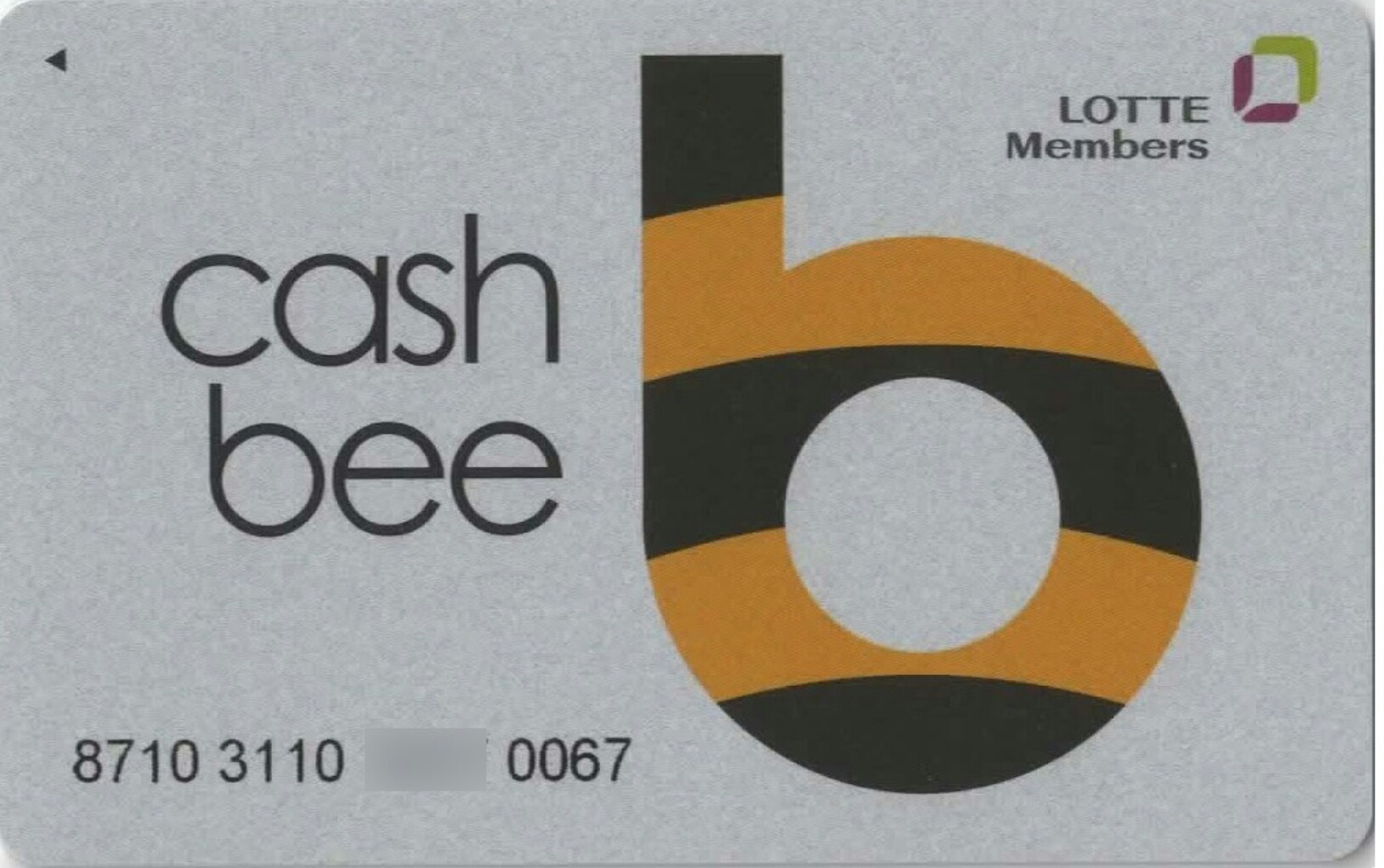 이비카드 캐시비 기본카드 일반용